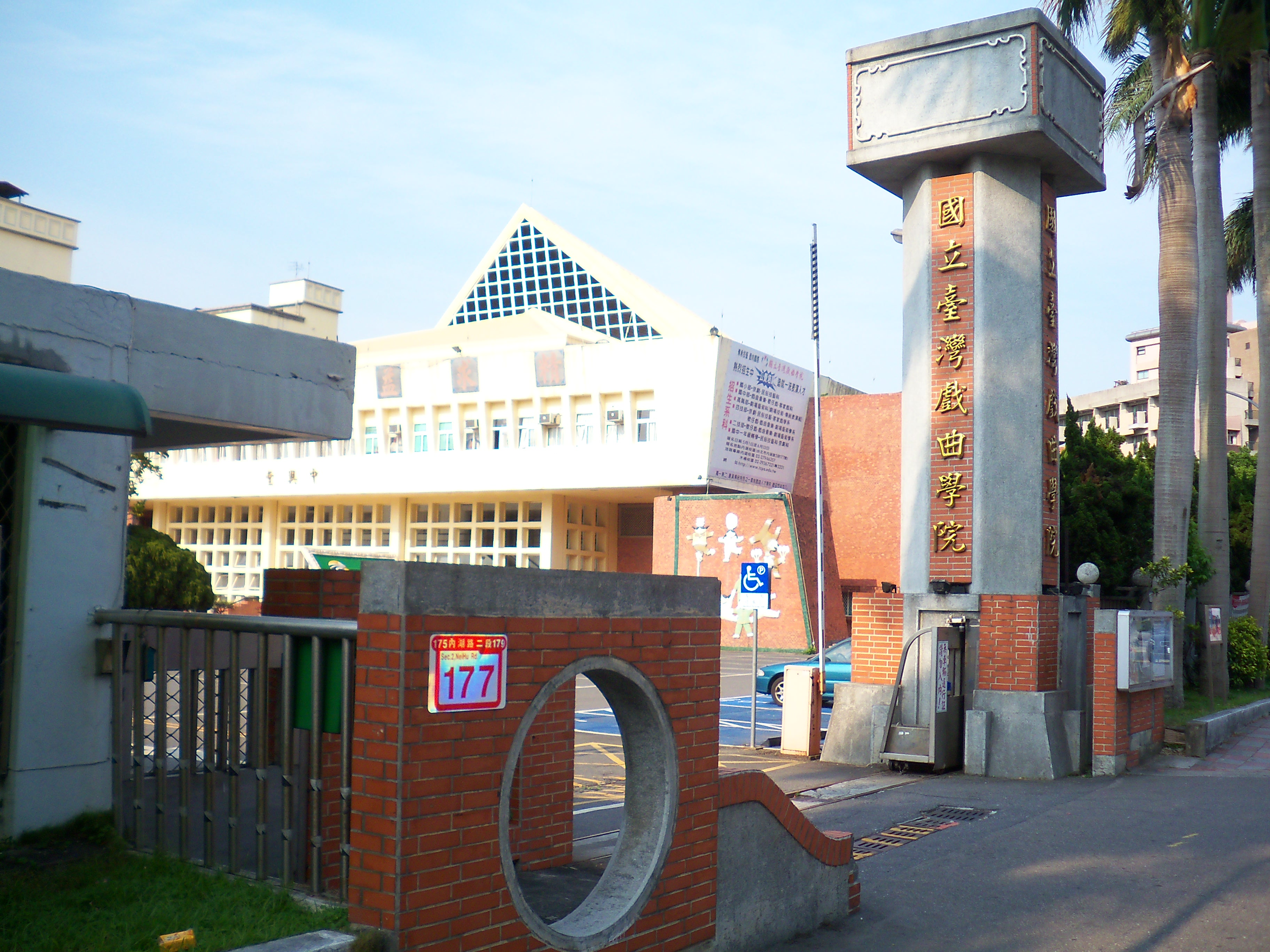 國立臺灣戲曲學院內湖校區正門。